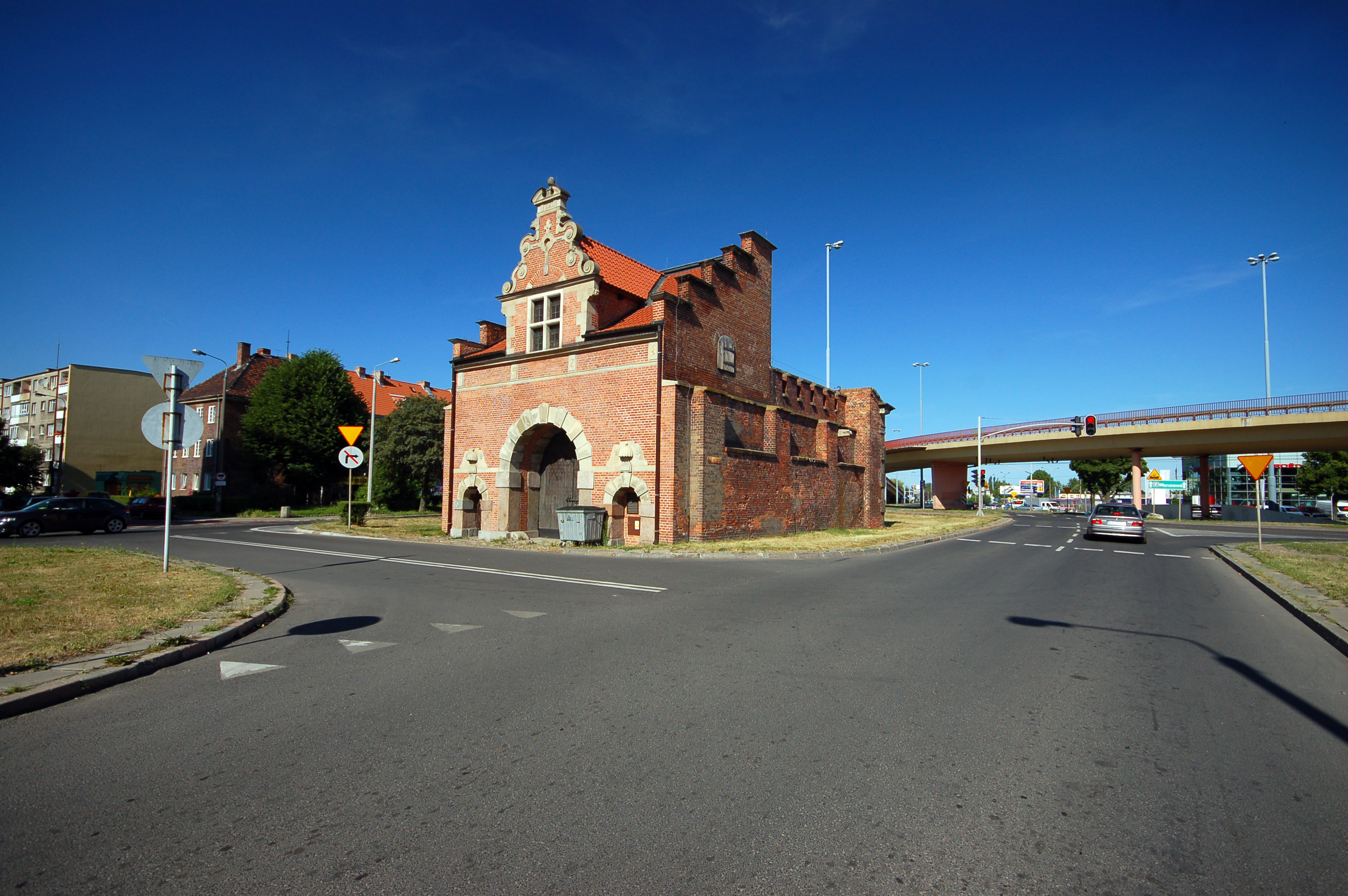 Gdańsk Długie Ogrody, ul. Długie Ogrody - Brama Żuławska (Brama Długich Ogrodów), XVII